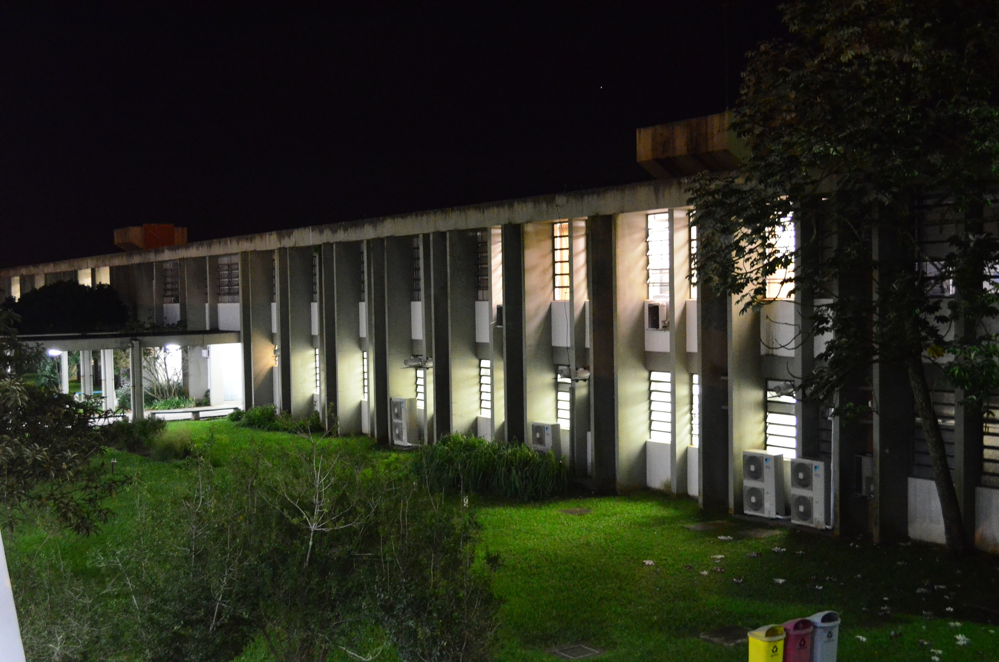 Prédio de Ciências Biológicas Unisinos